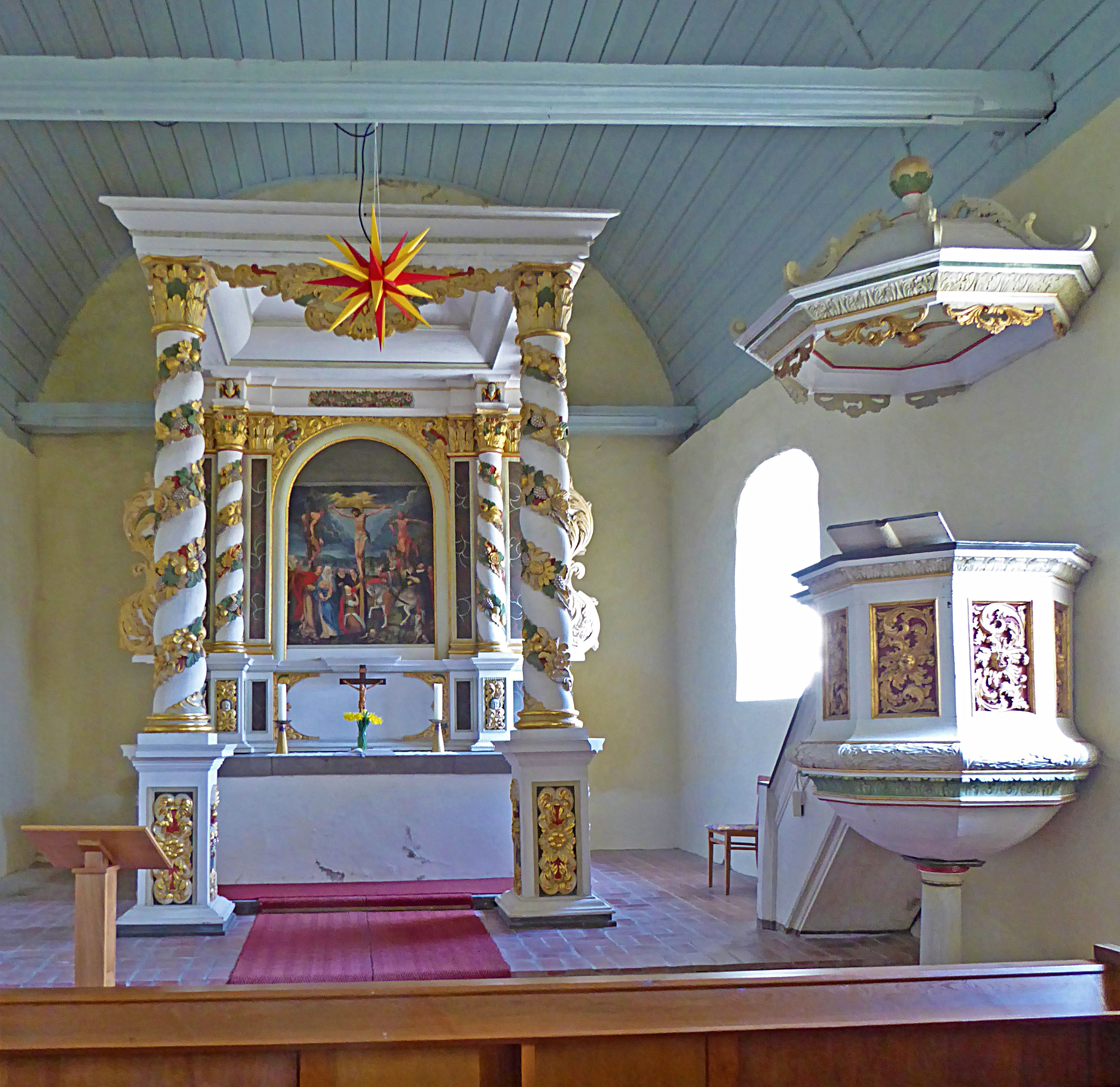 Blick zum Altar in der Dorfkirche St. Petrus und Paulus (Großberndten)